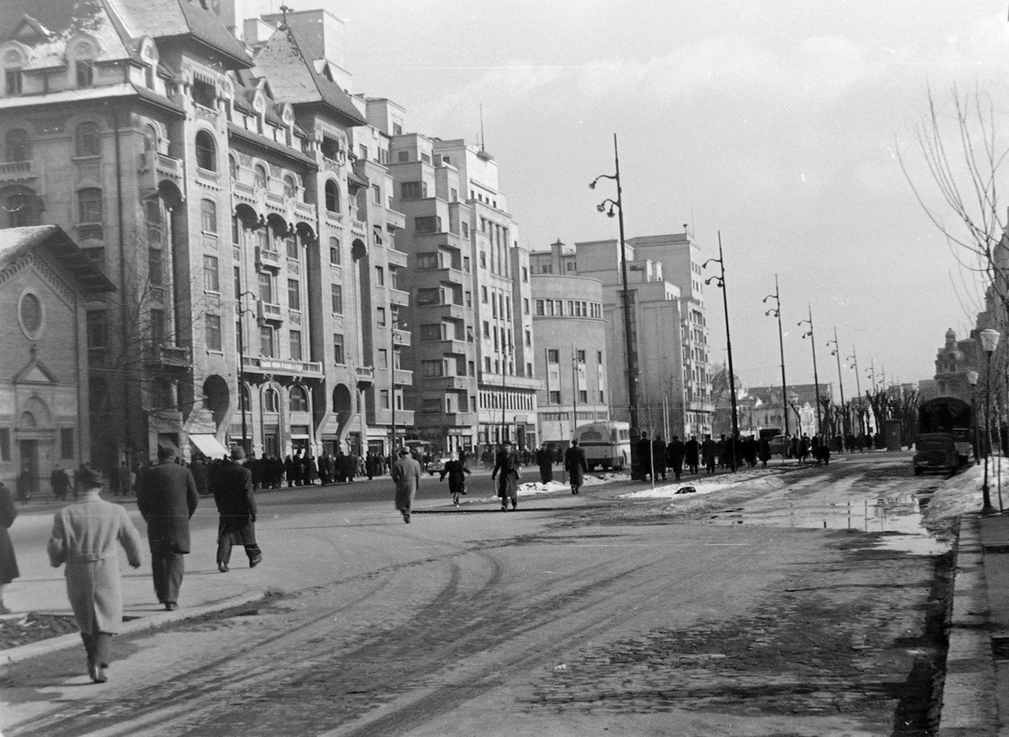 Strada Vasile Conta, a kép bal szélén az un. Olasz templom. Location: Romania, Bucharest Title: Strada Vasile Conta, a kép bal szélén az un. Olasz templom.